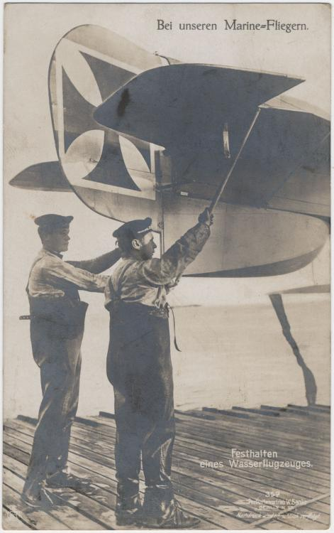 "Bei unseren Marine-Fliegern", Sanke Postkarte Nr. 357